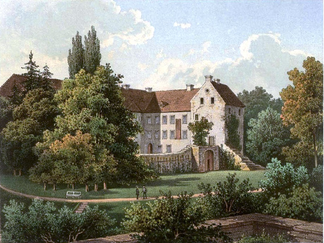 Schloss Altenhausen, Kreis Neuhaldensleben, Provinz Sachsen